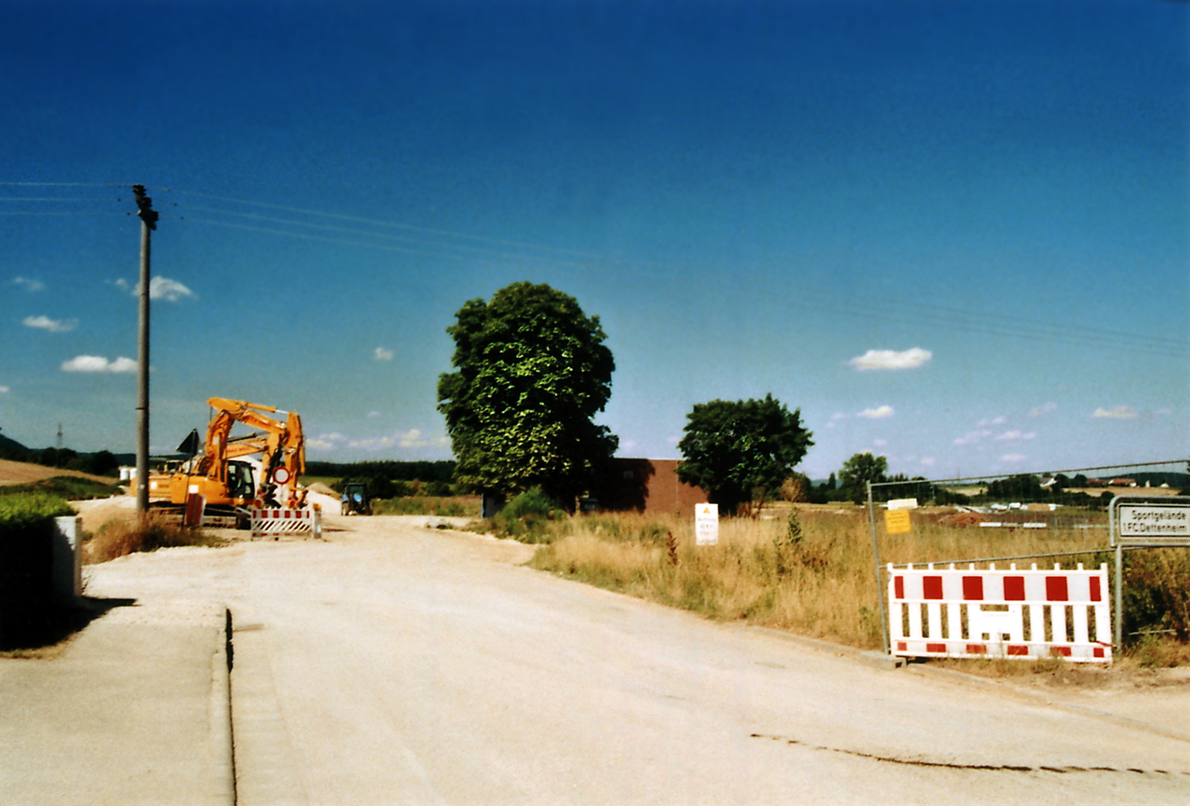 Dettenheim/Weißenburg: Neubau und Verlegung der Bundesstraße 2 um den Ort. Blick vom Ortsausgang an der Rezatstraße zur neu aufgeschütteten Brückenrampe über die Umgehungsstraße. Unter dem hohen Baum am Wasserhaus befand sich zum Zeitpunkt der Aufnahme das Grabungsbüro der Firma Archbau. Der Bau der Umgehungsstraße wurde von Oktober 2014 bis Ende Juli 2015 von umfangreichen archäologischen (Dr. Arne Schmidt Hecklau) und geoarchäologischen (Britta Kopecky-Hermanns) Untersuchungen begleitet, die zahlreiche Befunde verschiedener Zeitstellungen dokumentieren konnten. Die Notgrabungen fanden mit Unterstützung der Deutsche Forschungsgemeinschaft (DFG) im Rahmen des Projekts Häfen von der Römischen Kaiserzeit bis zum Mittelalter statt. Aufnahme vom Freitag nachmittag, 31. Juli 2015.